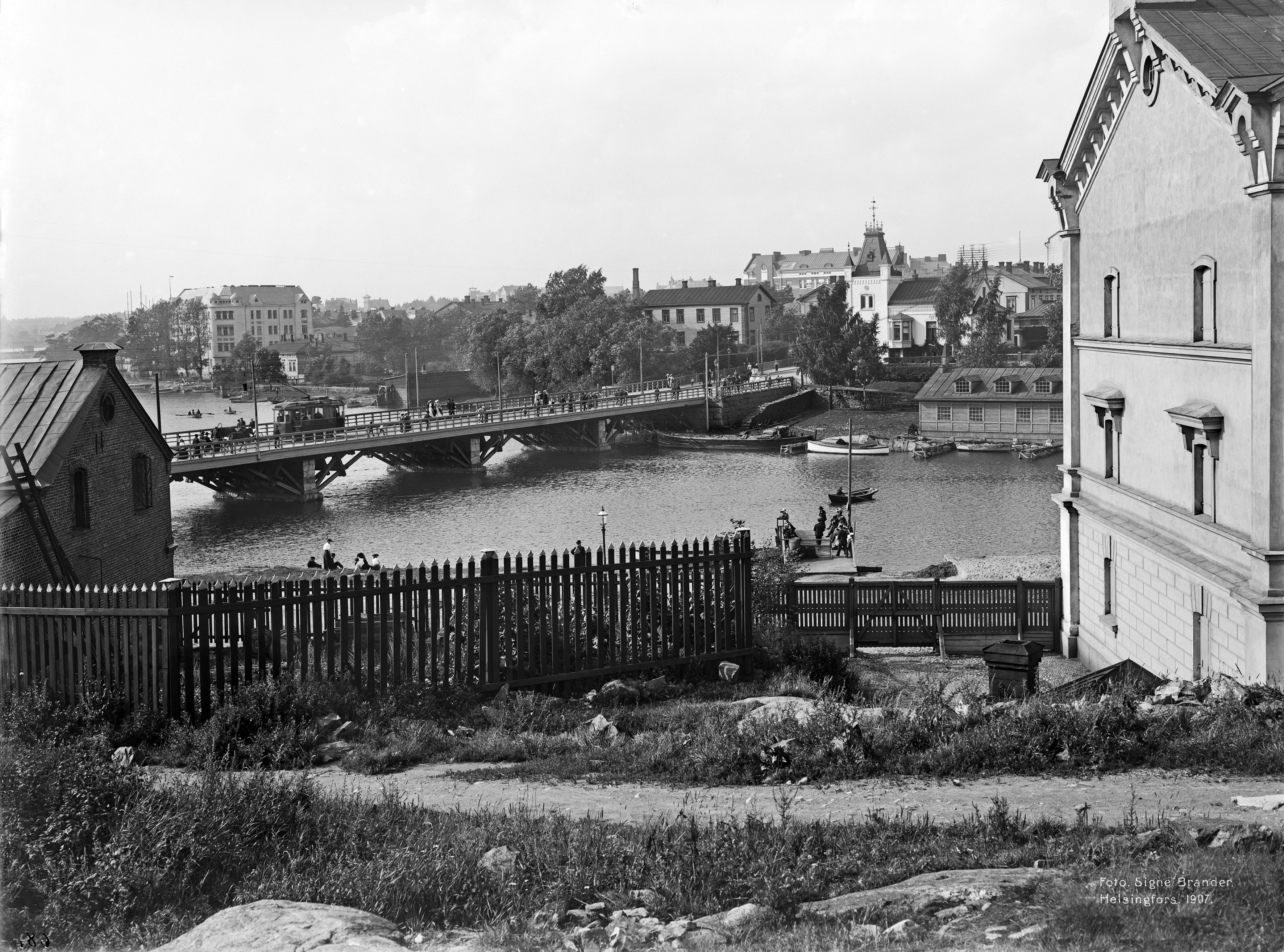 Pitkäsilta Siltavuorenrannasta nähtynä. Etualalla oikealla Siltavuorenranta 16. Keskellä Siltavuorensalmi.Taustalla Siltasaari, vasemmalla Siltasaarenkatu 2 ja oikealla Siltasaarenkatu 1, Stenbergin huvila -- negatiivi ja vedos, lasi paperi pahvi, mv